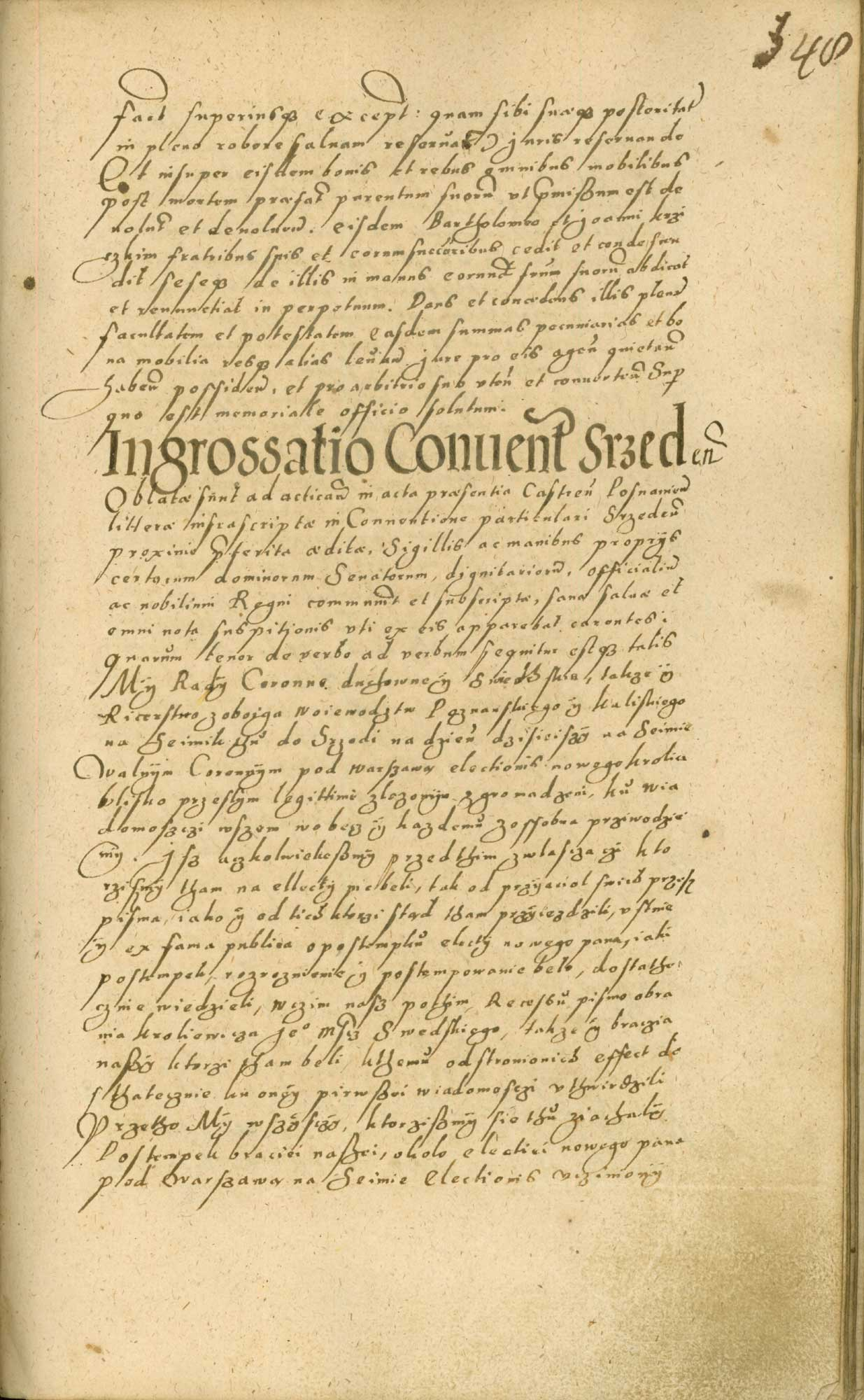 19 IX 1587, Środa Szlachta zebrana na sejmiku posejmowym województw poznańskiego i kaliskiego w Środzie ratyfikuje i potwierdza przeprowadzony na sejmie elekcyjnym dnia 19 VIII 1587 r. wybór królewicza szwedzkiego Zygmunta Wazy, syna Katarzyny Jagiellonki, siostrzeńca króla polskiego Zygmunta Augusta i królowej polskiej Anny Jagiellonki, na tron polski po śmierci króla Stefana Batorego, a słysząc o jednoczesnym wyborze i zamiarze wprowadzenia do Korony Polskiej arcyksięcia Maksymiliana Habsburga, zapowiada zbrojne przeciwstawienie się tym planom w porozumieniu z hetmanem wielkim koronnym Janem Zamoyskim. Opis zewnętrzny: Oryginał, jęz. polski i łaciński, karty papierowe o wymiarach 200x320 mm, 4 karty. Miejsce przechowywania: Archiwum Państwowe w Poznaniu, Księgi sądu i urzędu grodzkiego w Poznaniu, sygn. 150, k. 548-551v.